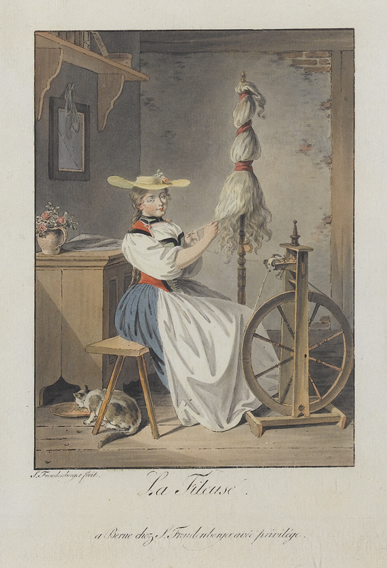 La Fileuse. (Die Spinnerin). Umrissradierung, koloriert, 26.6 x 18.3 cm